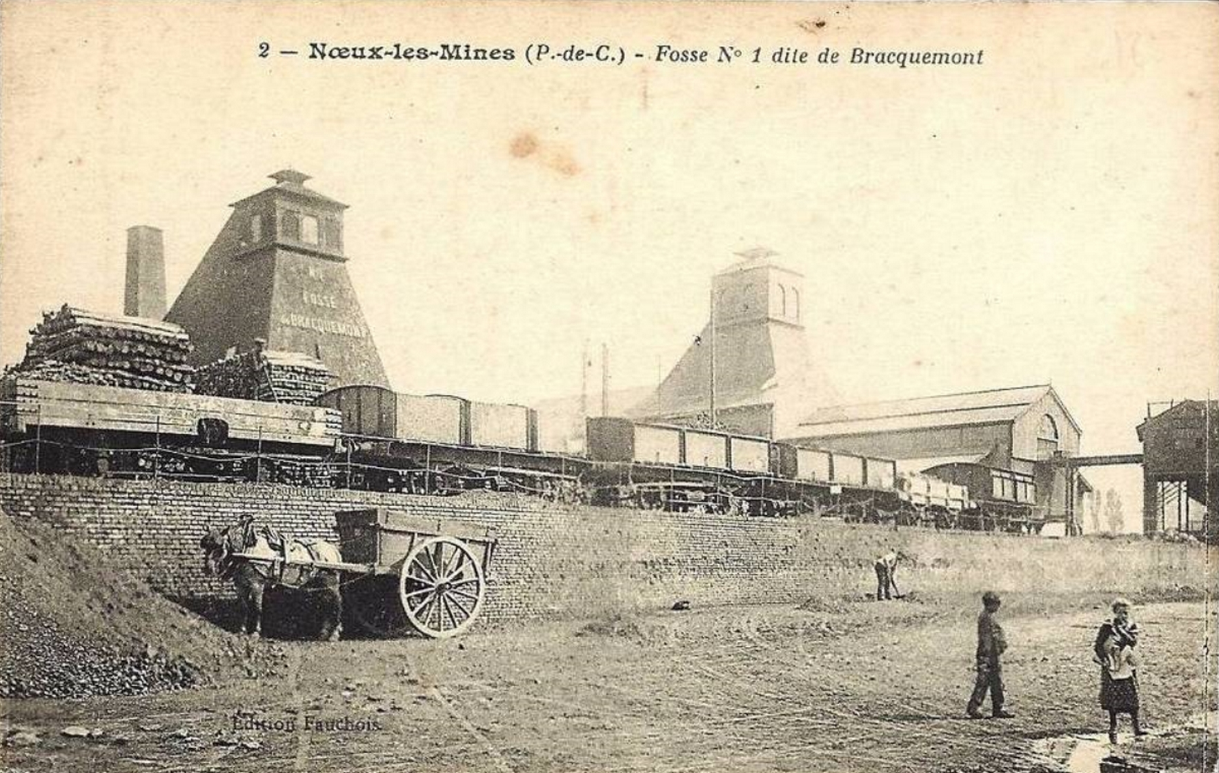 Fosse n° 1 - 1 bis de la Compagnie des mines de Nœux, Nœux-les-Mines, Pas-de-Calais, Nord-Pas-de-Calais, France.